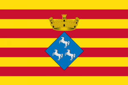 Bandera del municipio de Viladecaballs